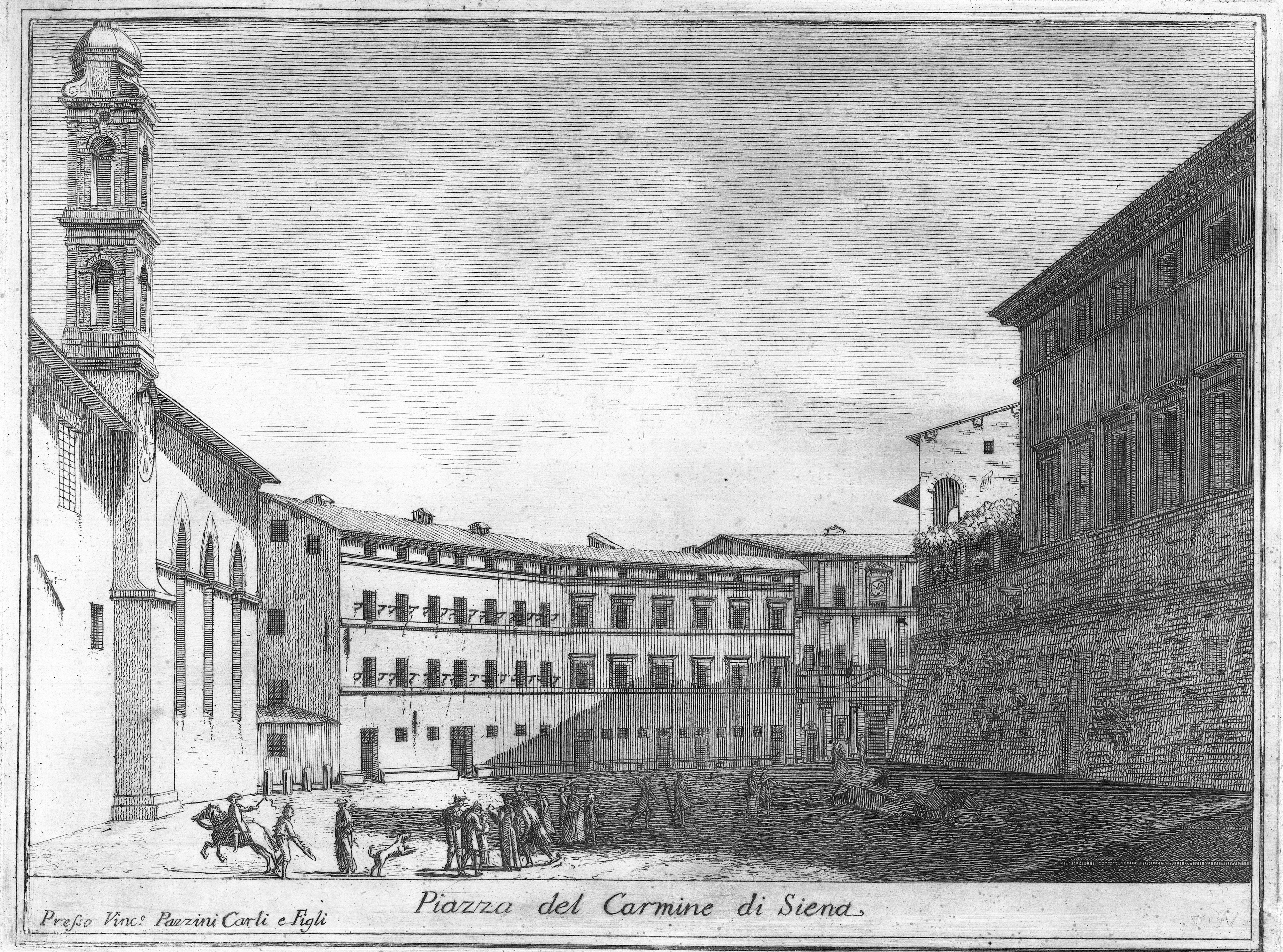 Stampa raffigurante la piazza del Carmine di Siena, oggi Pian de' Mantellini. Si trovano, sulla destra, palazzo Celsi Pollini, sulla sinistra, la Chiesa di San Niccolò al Carmine e seguendo, palazzo Picolomini Bellanti (non ancora con la facciata neoclassica), palazzo Ravizza e palazzo Fineschi Sergardi.